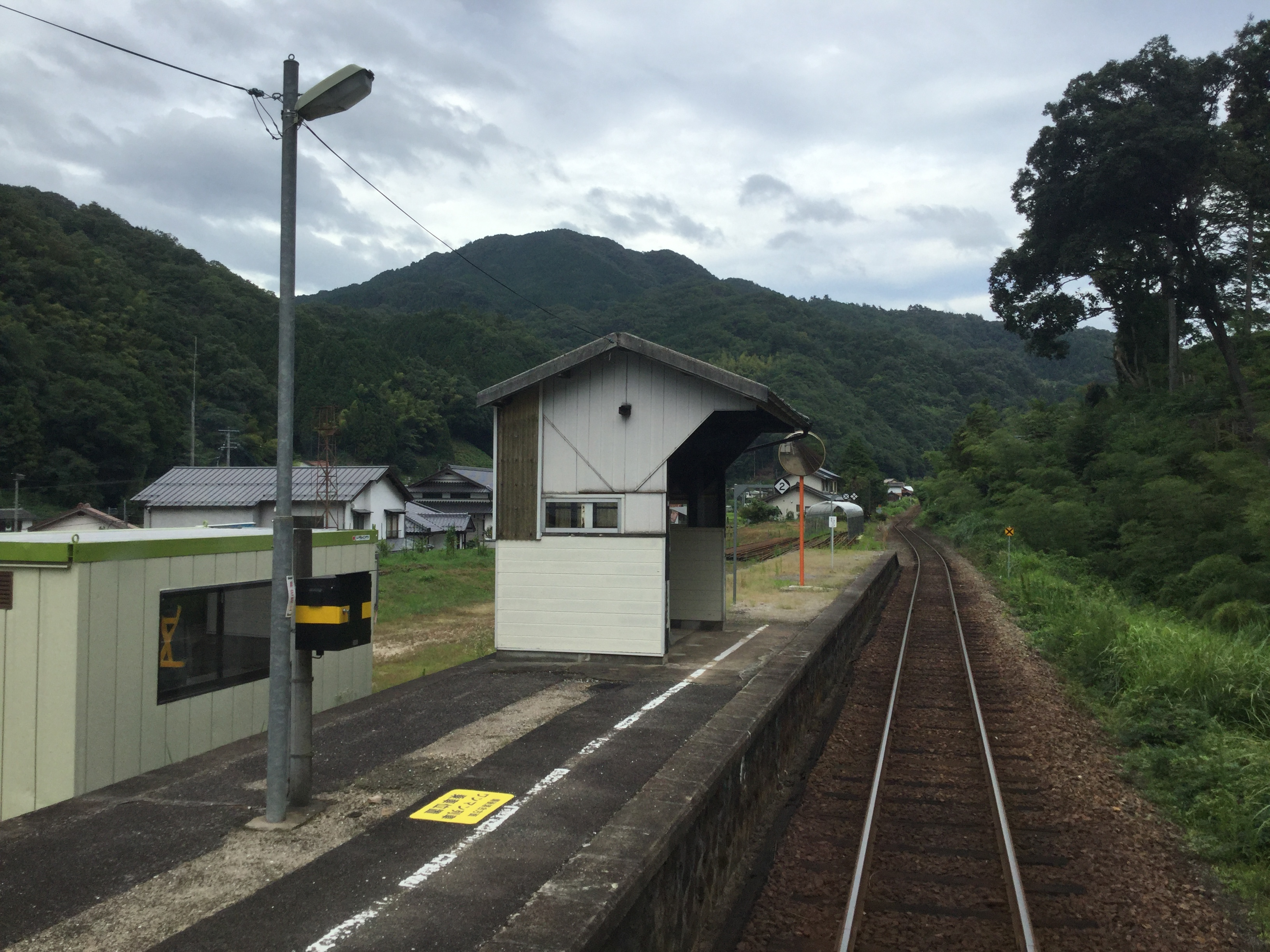 Shimokuno Station (下久野駅)